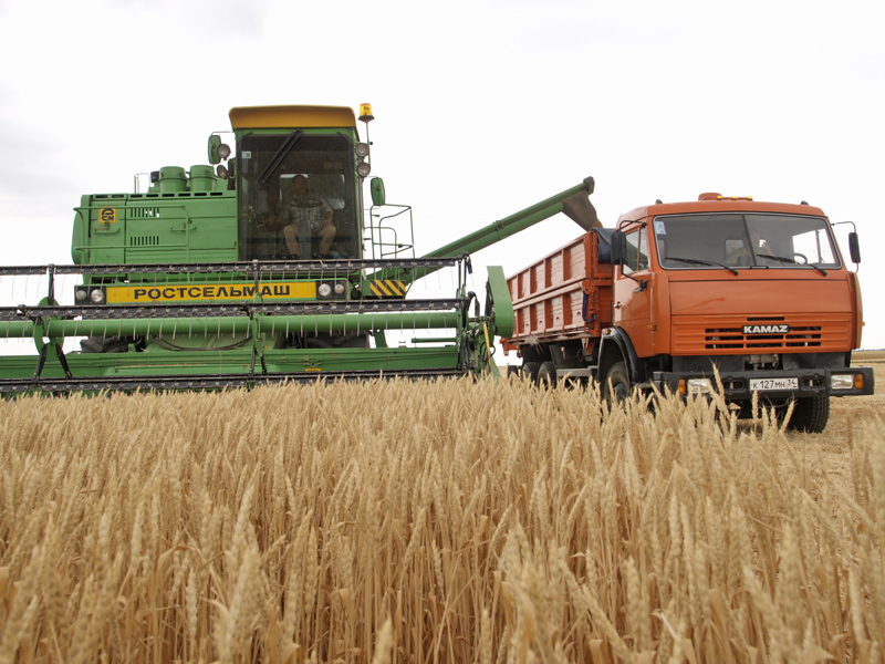 Уборка урожая в Волгоградской области. Комбайн Дон-1500.